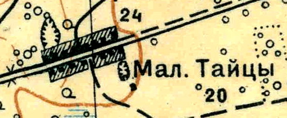 Топографическая карта Ленинградской области, квадрат О-36-13-А-а (Большая Пудость), деревня Малые Тайцы